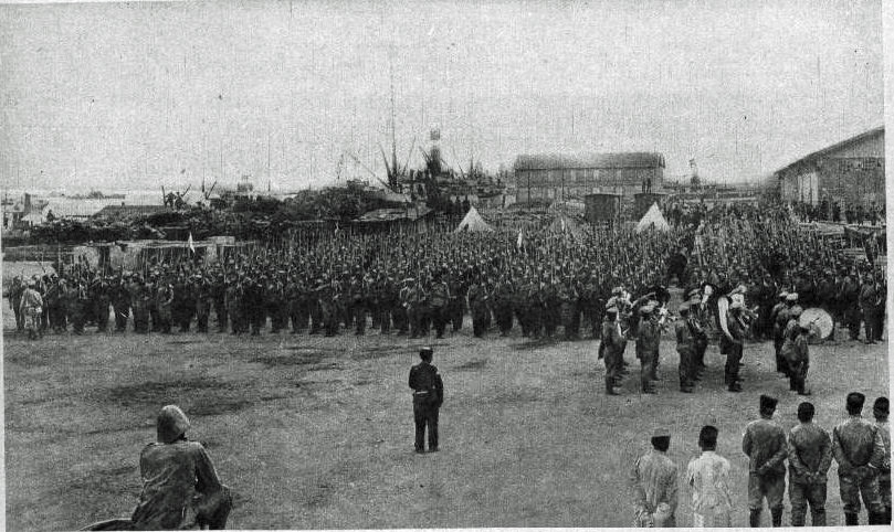 extrait du journal "le miroir".